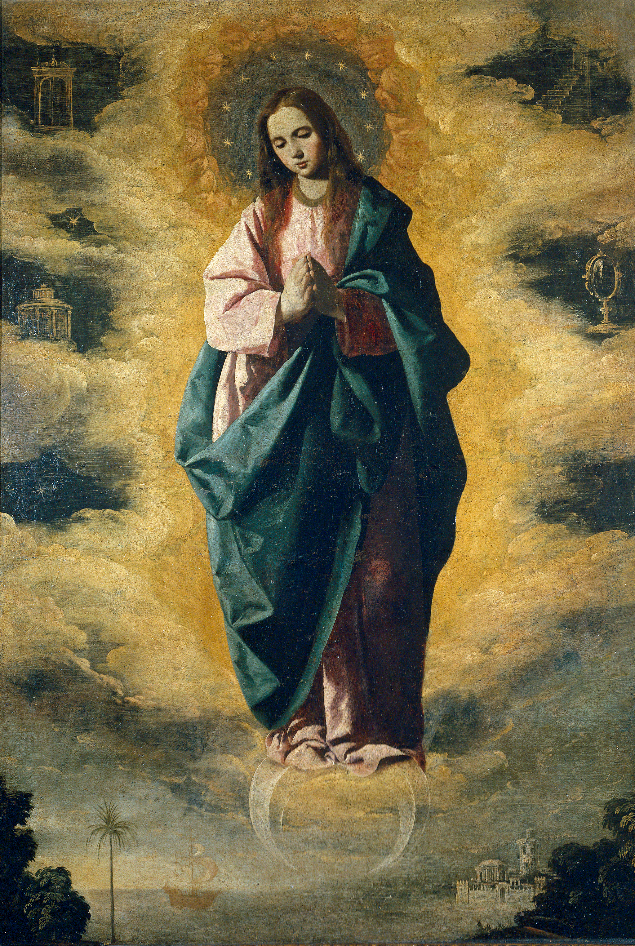 Francisco de Zurbarán, Inmaculada Concepción, óleo sobre lienzo, 128 cm x 89 cm. Museo del Prado.